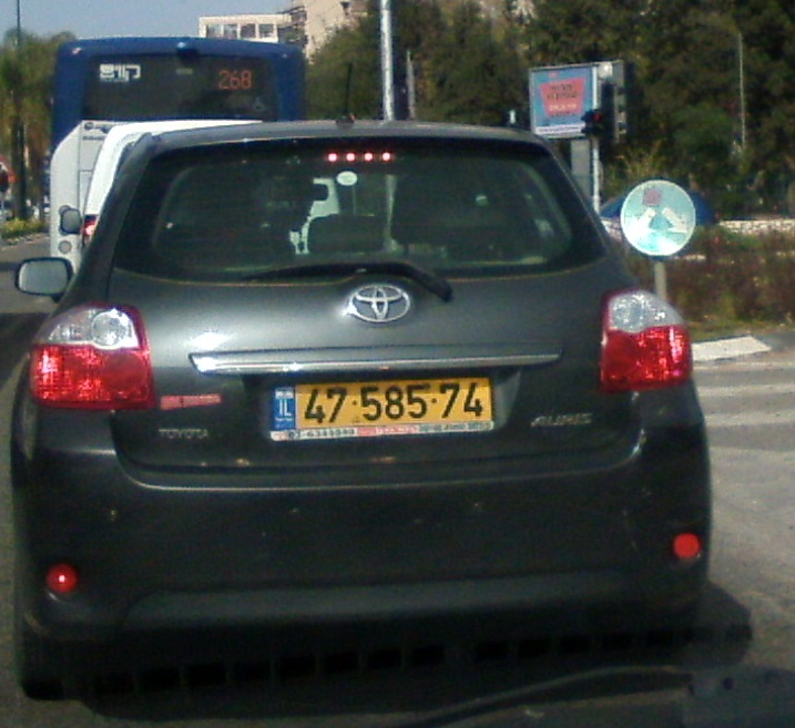 צבעי CMYK של דפוס אופסט על בד